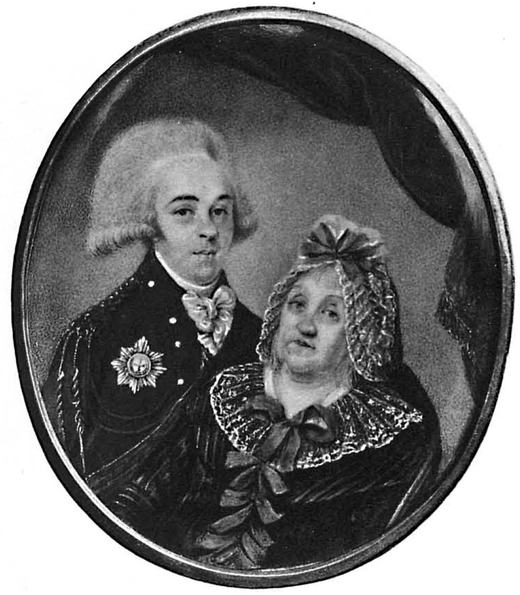 Мария Степановна Талызина (1742-1796) и её брат, Степан Степанович Апраксин (1757-1827)